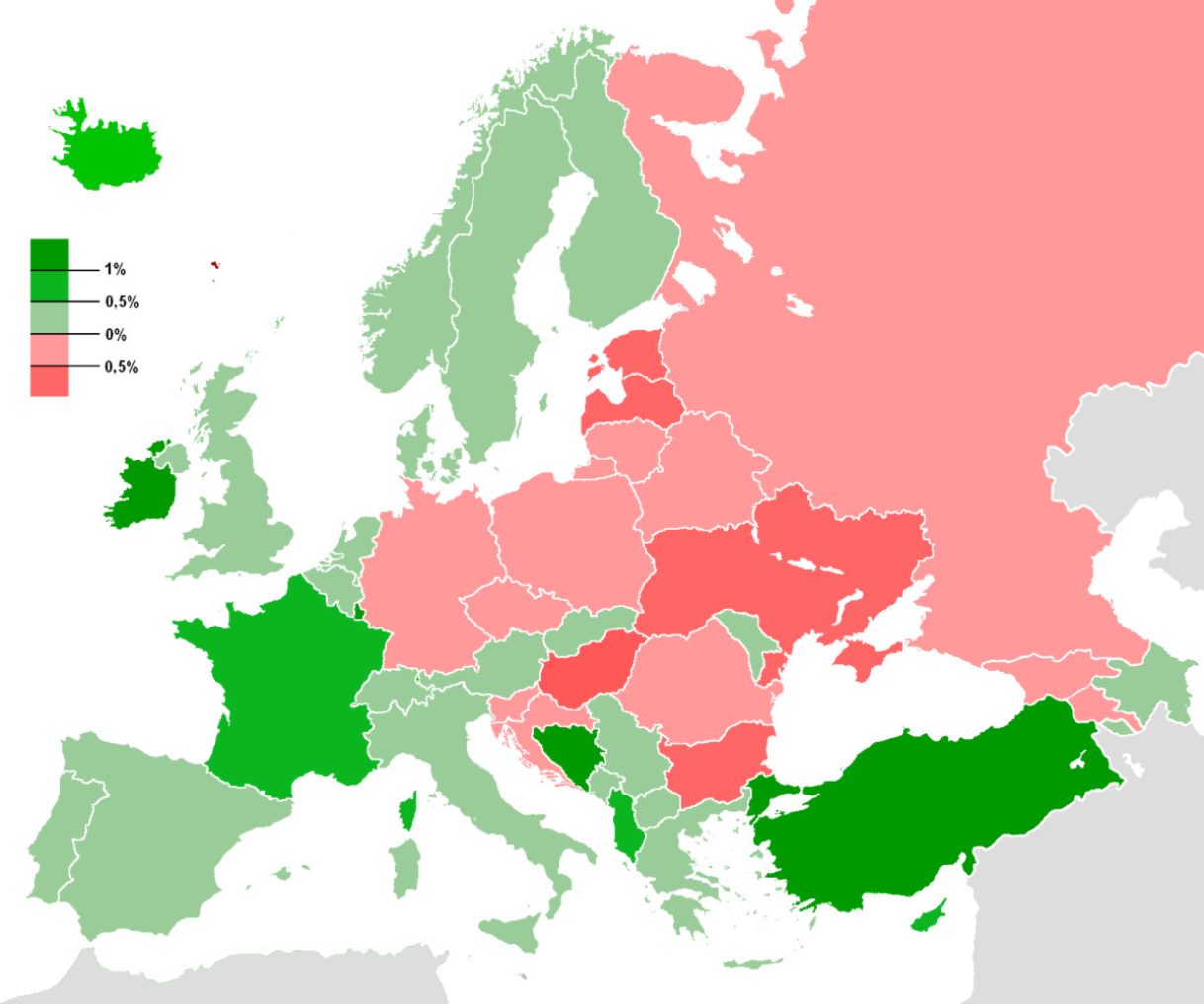 Demographiekarte Europa